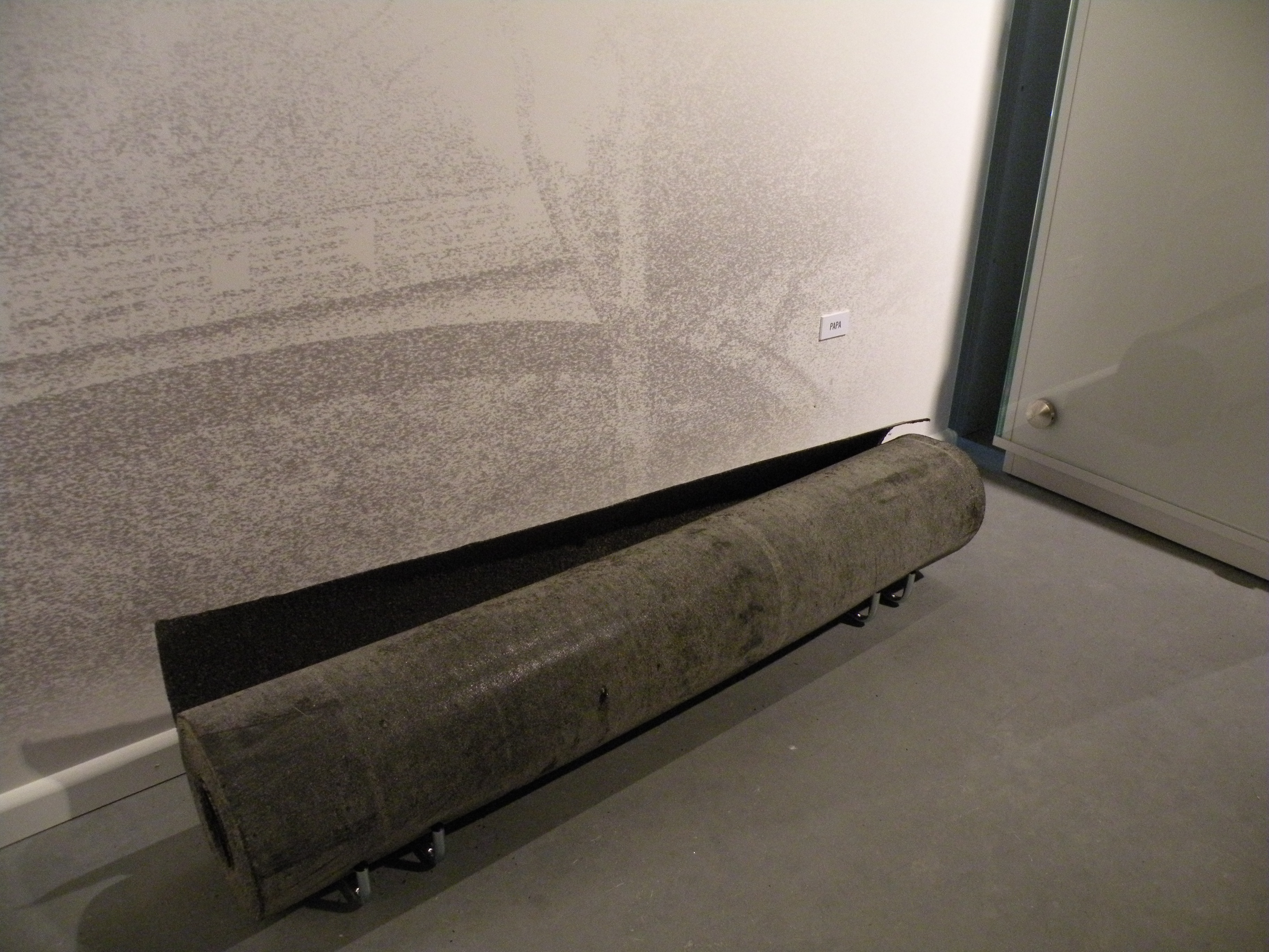 Rolka papy w Muzeum Nowoczesności w Olsztynie